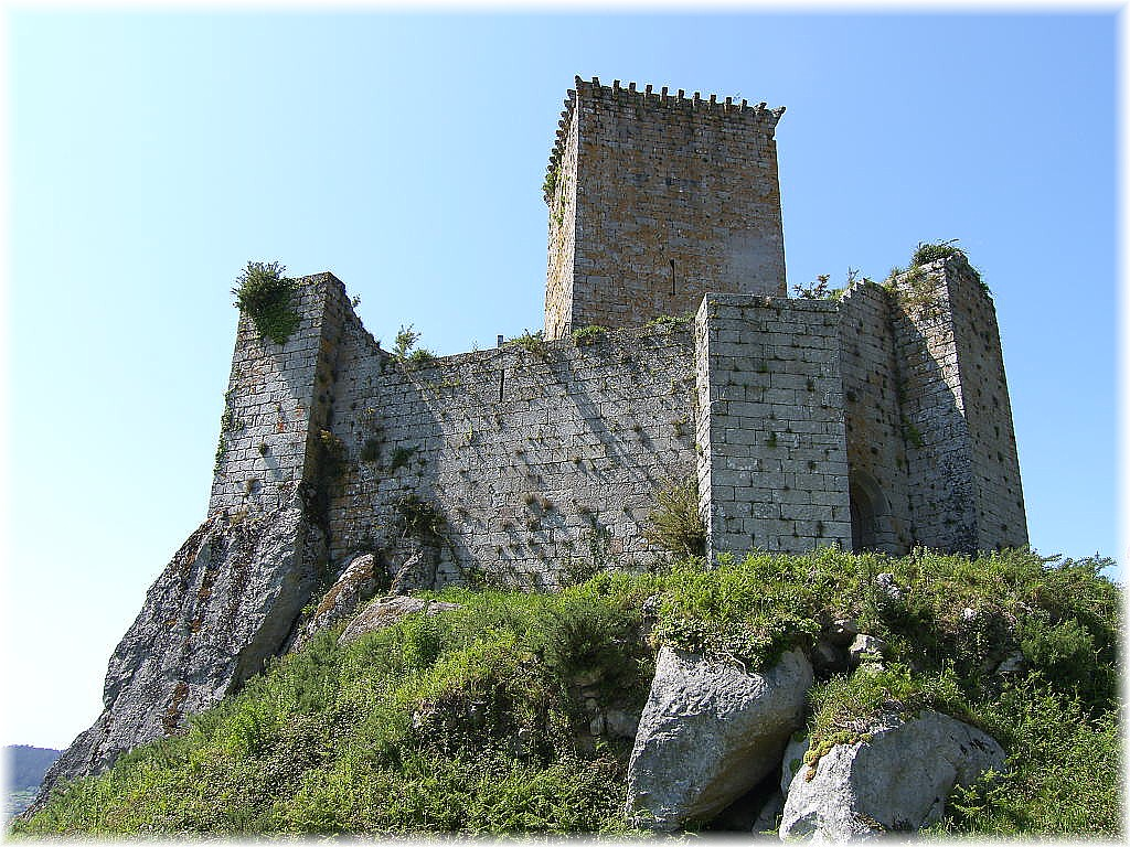 Castelo de Andrade, Castle of Nogueirosa